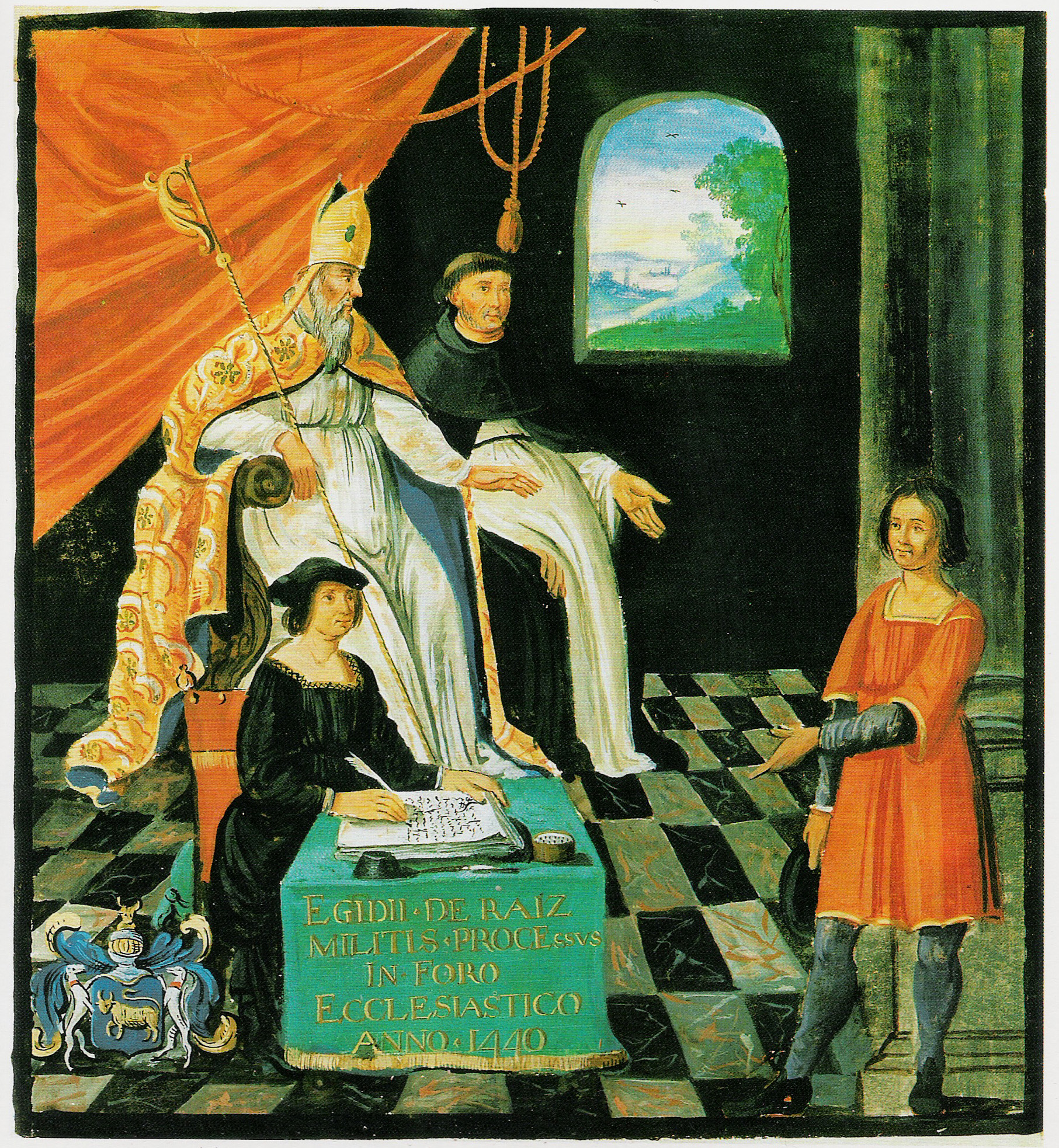 Miniature représentant le procès de Gilles de Rais. Dans le coin inférieur gauche : armes de Jean Bouhier, président à mortier au parlement de Dijon (d'azur au chevron d'or, accompagné en chef de deux croissants d'argent, et en pointe d'une tête de bœuf d'or). Manuscrit à peinture, Bibliothèque nationale de France (BnF), XVIIe siècle.